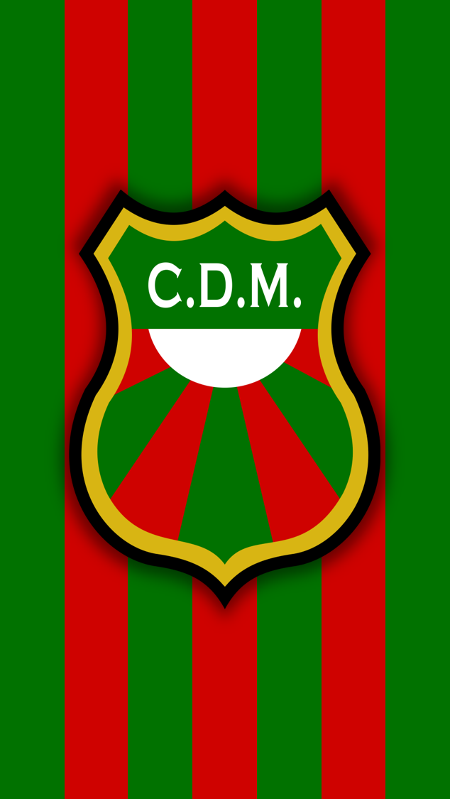 Escudo de Deportivo Maldonado